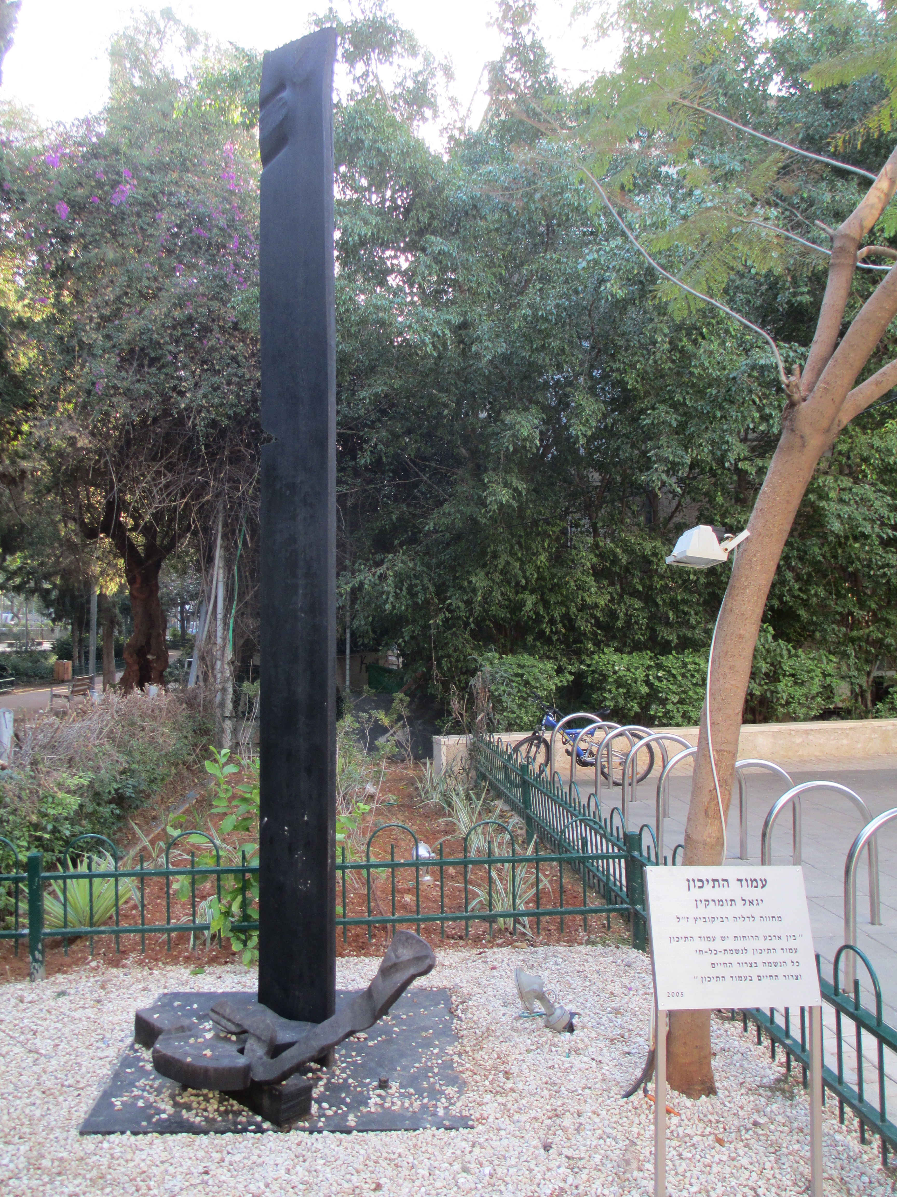 הפסל "עמוד התיכון" של יגאל תומרקין בתל אביב